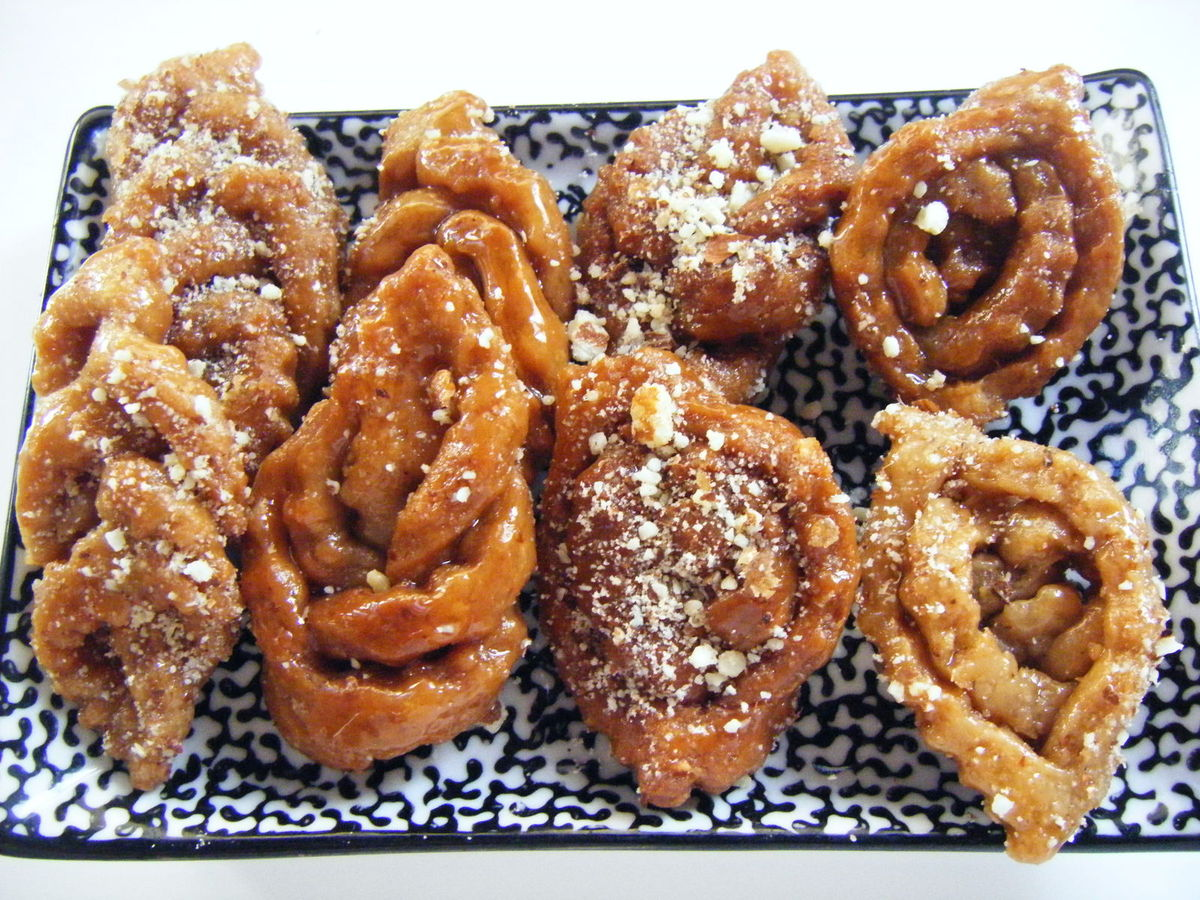 من أشهر الحلويات المغربية الخاصة بشهر رمضان This is an image of food from Morocco